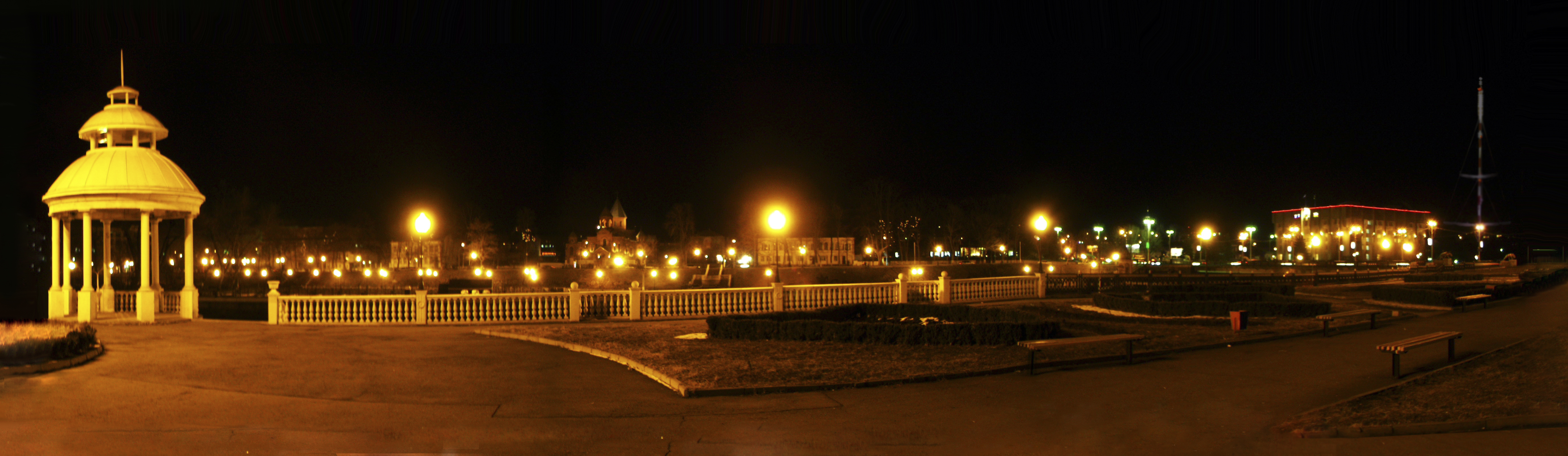 Набережная Владикавказа (справа - телебашня на Осетинской горке)